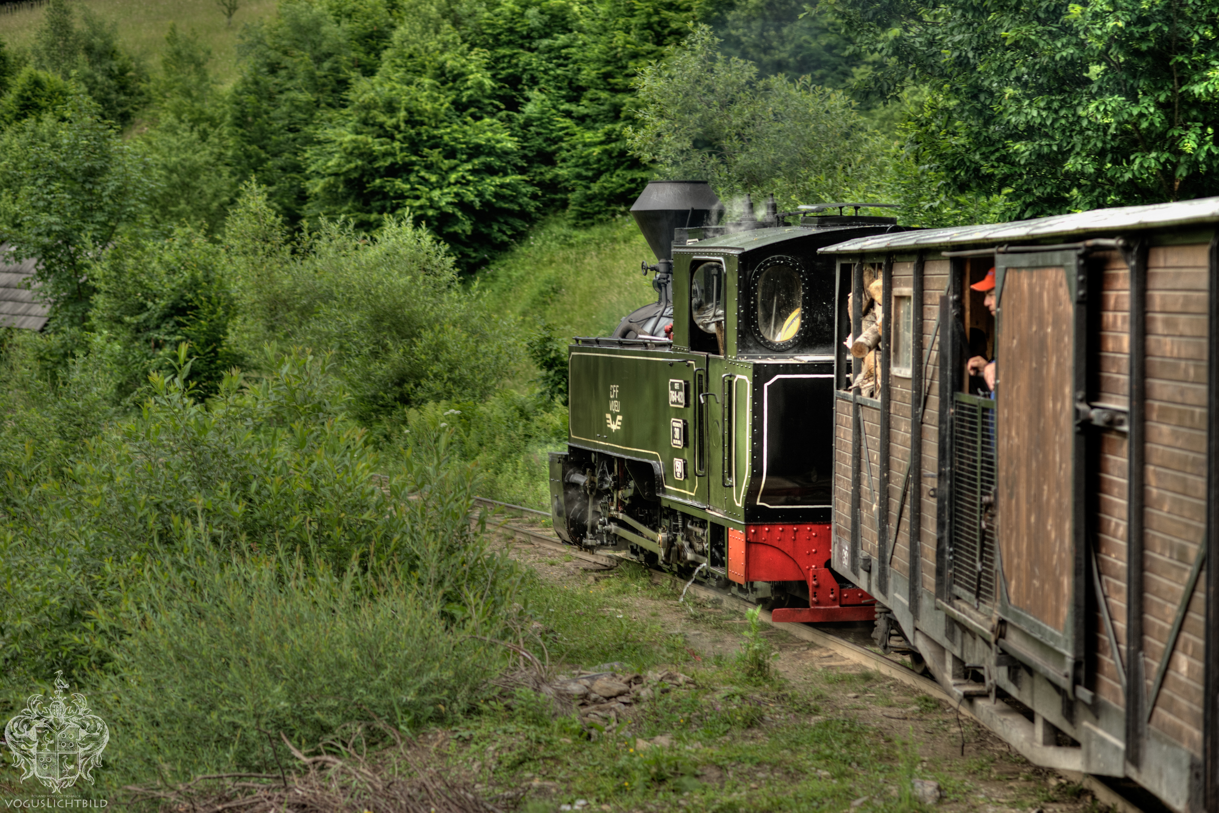 Die Kleinbahn bei ihrer Fahrt durch das Wassertal